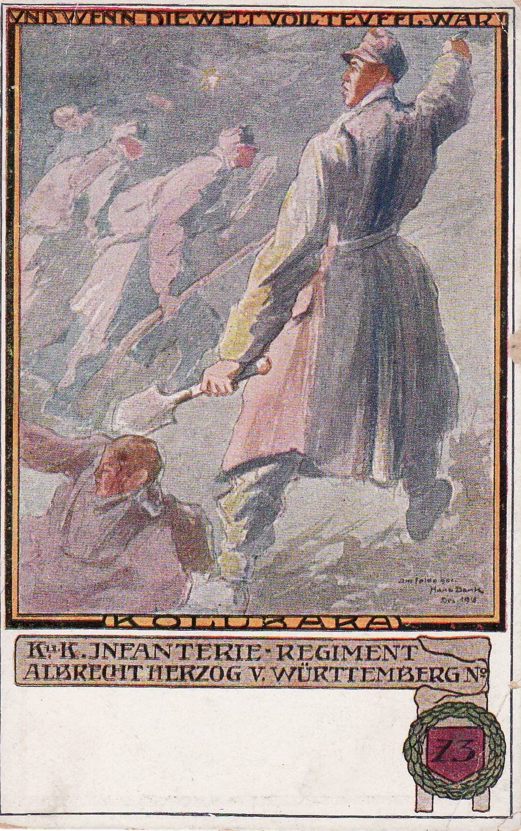 AK Kaiserlich und königliches Infanterieregiment Albrecht von Württemberg Nr. 73 bei der Schlacht an der Kolubara im November 1914